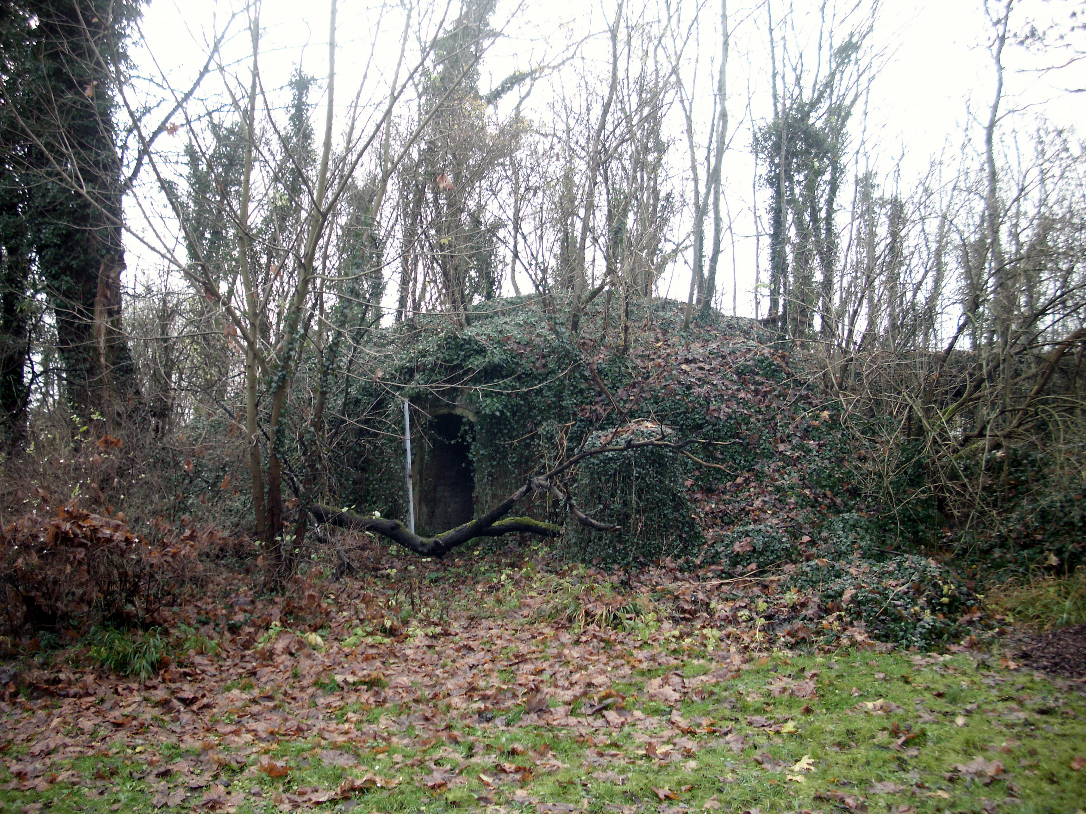 Eiskeller des ehemaligen Rittersitzes, Ragow, Gemeinde Ragow-Merz im Landkreis Oder-Spree, Brandenburg